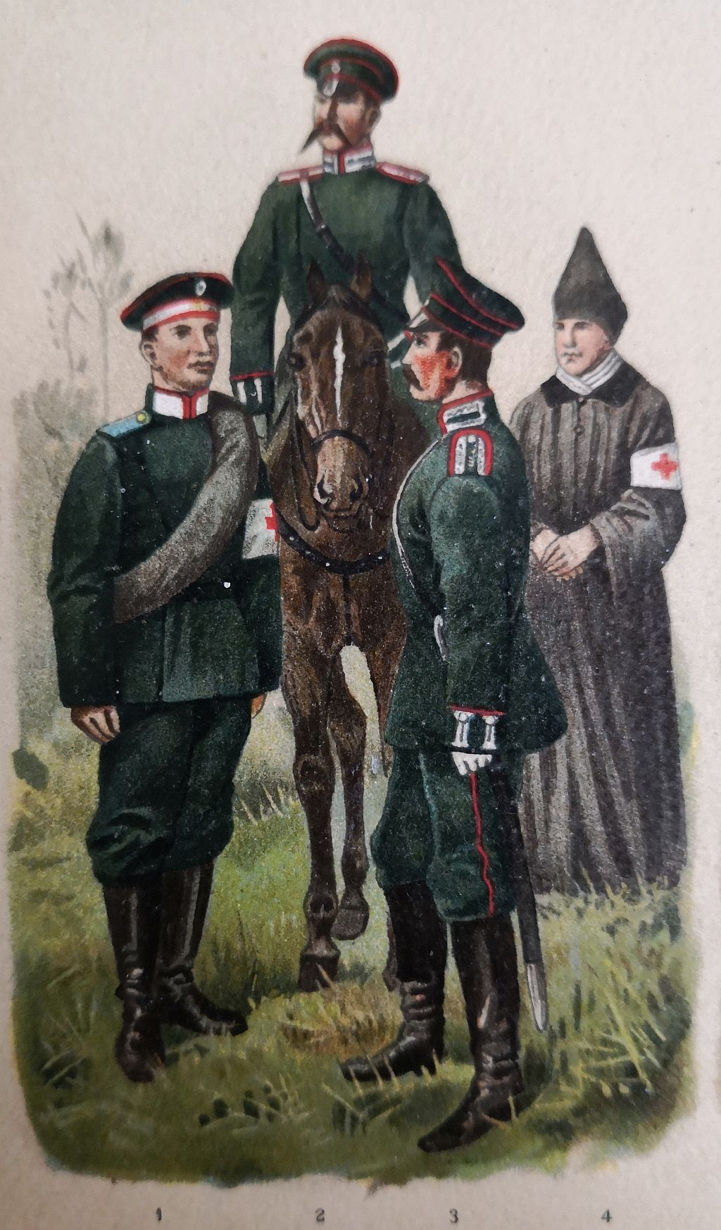 Uniformen des Sanitätskorps' Russlands, Ende des 19. Jahrhunderts: (1) Krankenträger der Infanterie (Uniform der betreffenden Regimenter mit Armbinde) (2) und (3) Militärärzte (4) Griechisch-katholische Nonne